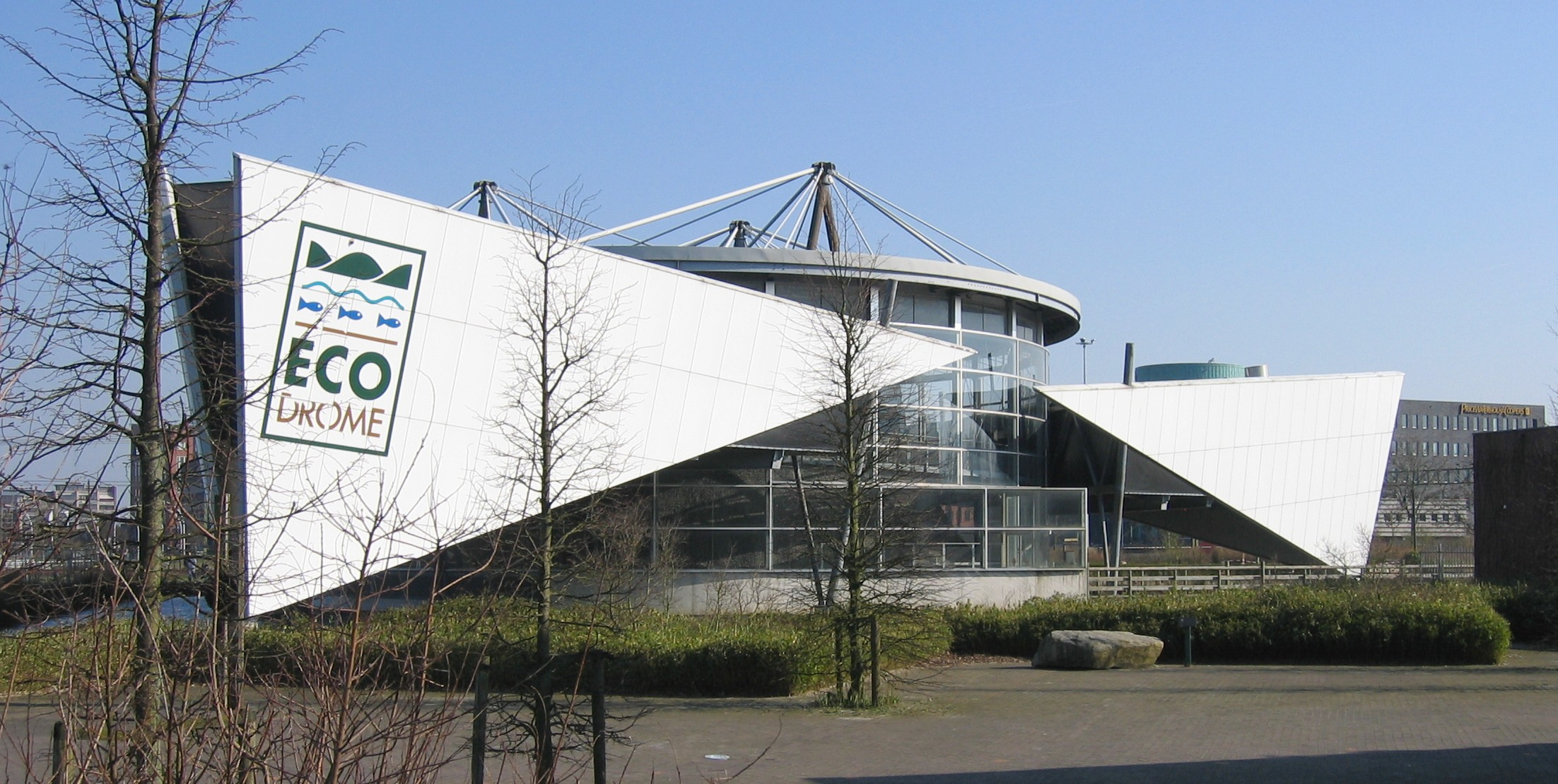 Ecodrome in Zwolle